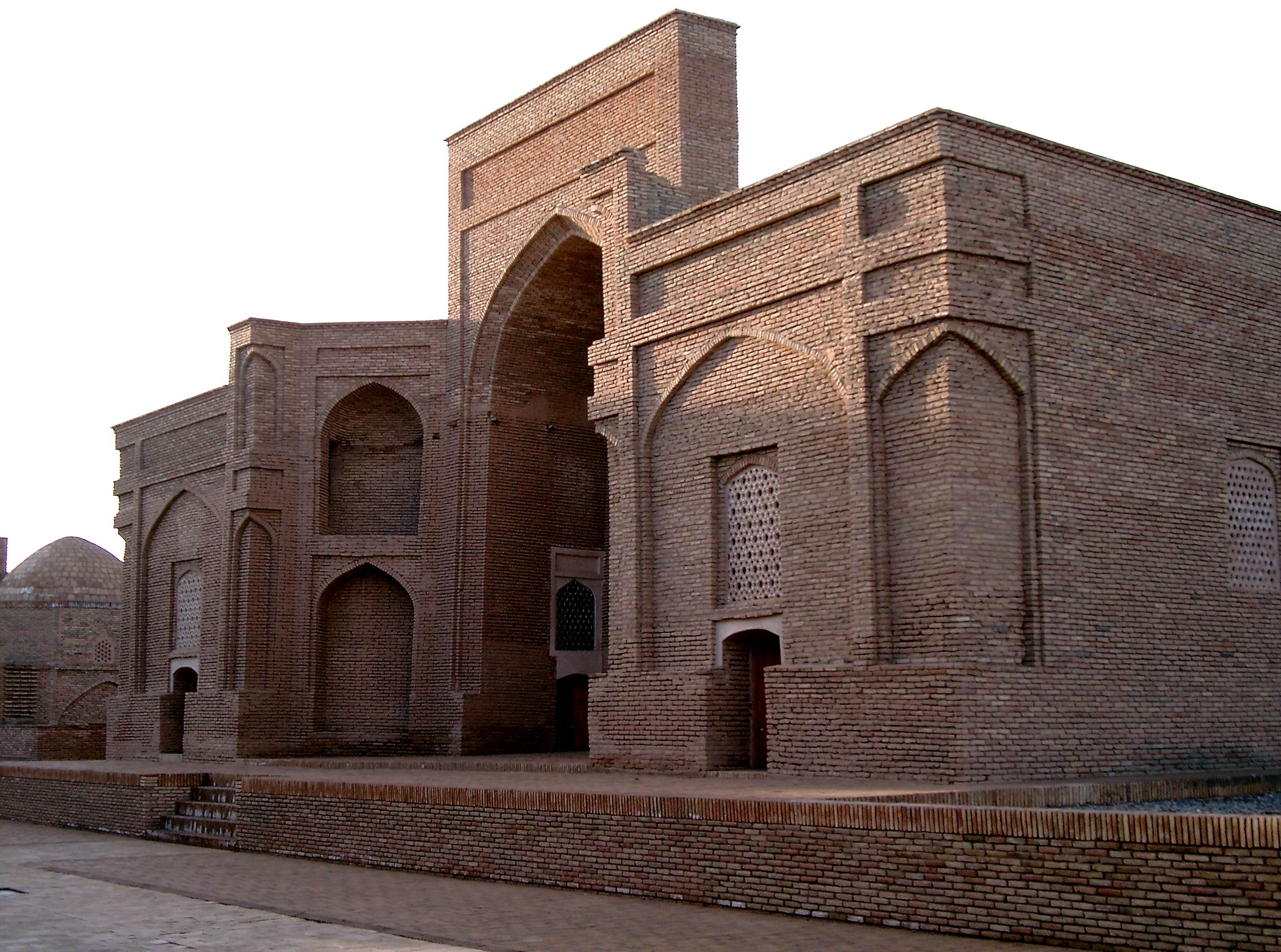 Seitansicht des Sultan-Saodat-Komplexes in Termiz